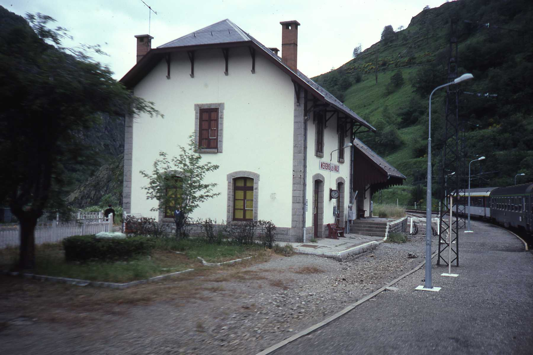 Het station bekeken vanaf de nachttrein.